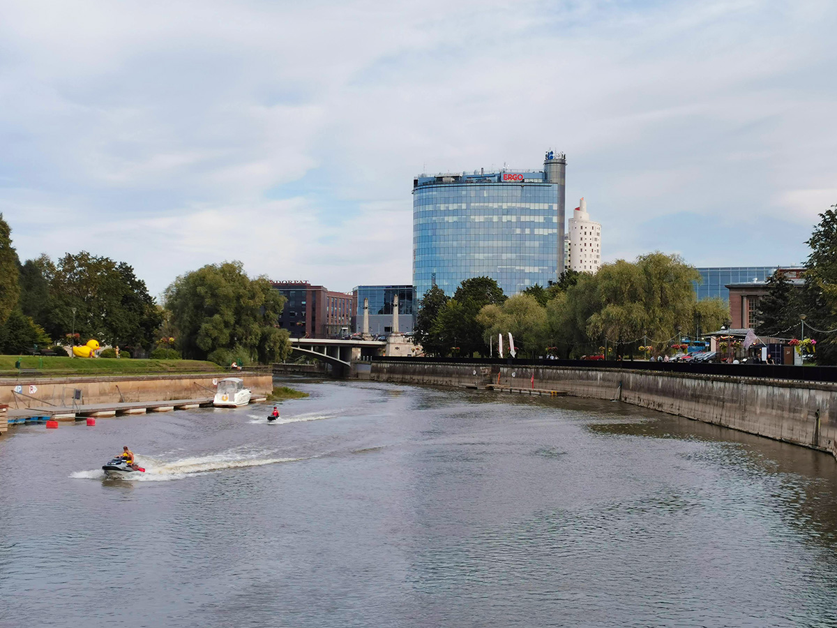 Emajõe ja Tasku ärikeskused ning Tigutorn